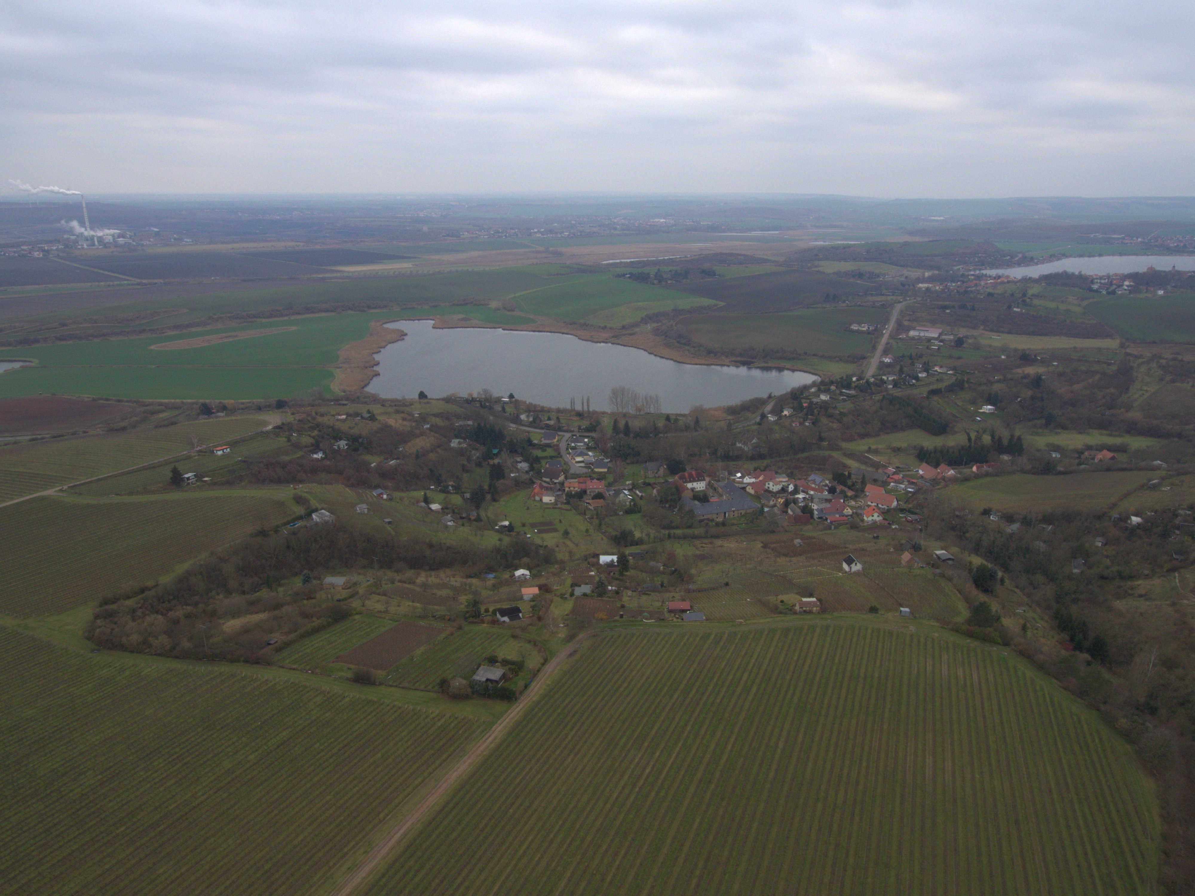 Bindersee Luftbild